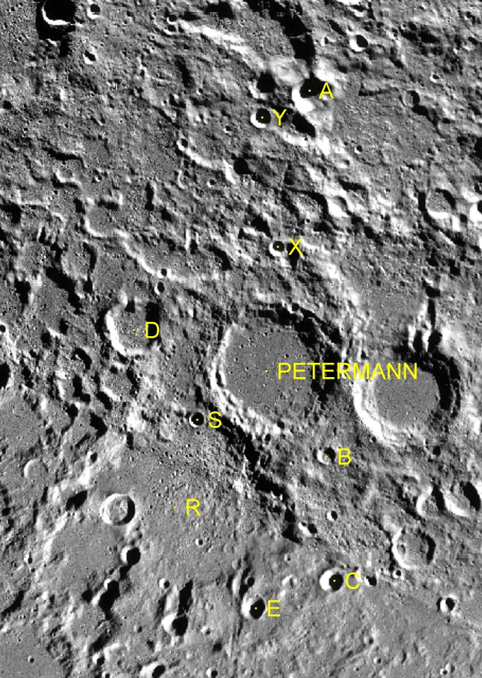 Cráter lunar Petermann. Cráteres satélite. (Imagen LRO)